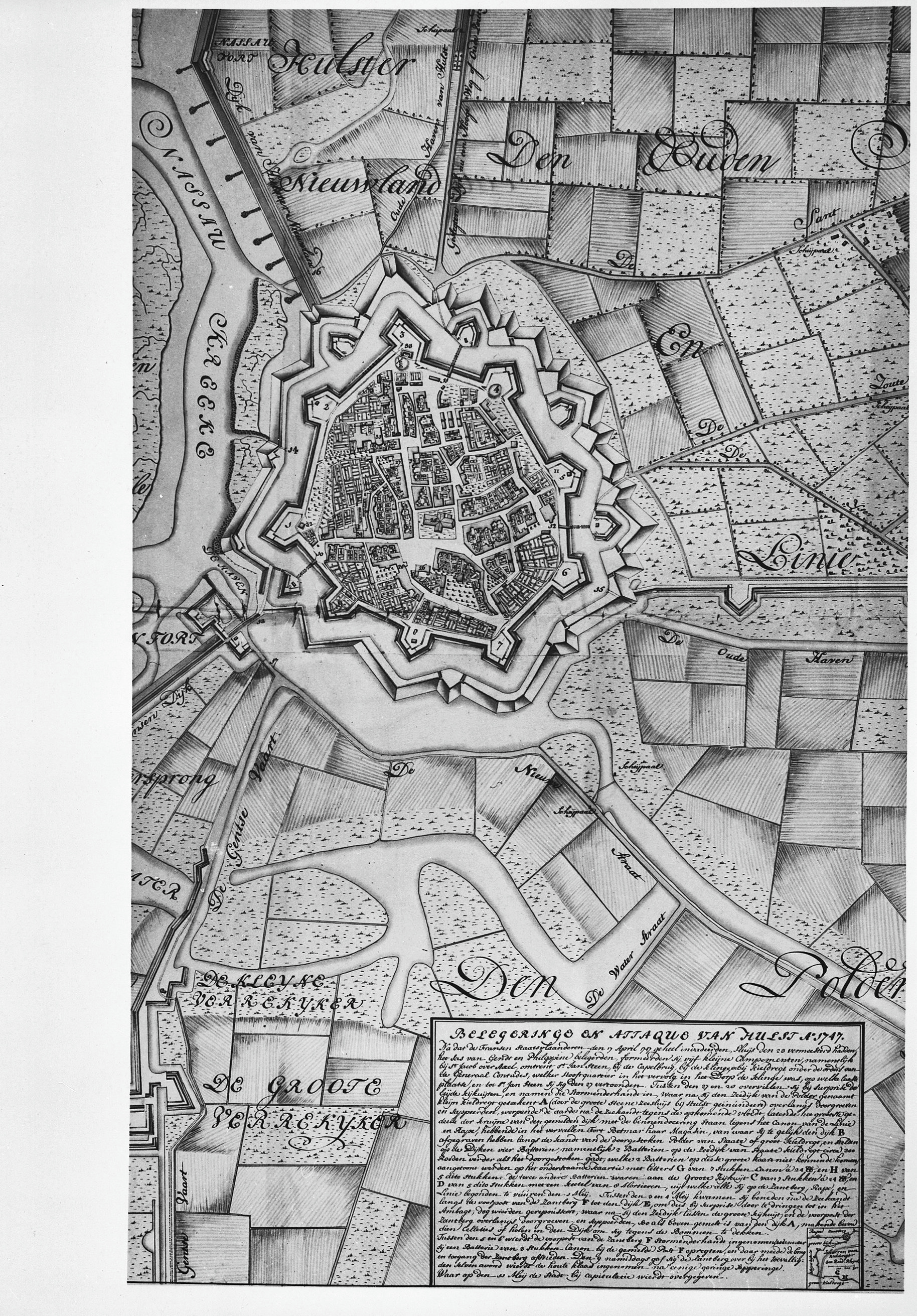 Plattegronden En Overzichten: gedeelte van plan der Stadt Hulst met de onderhorige forten, 1751, (Hastinga's) Rijksarchief Den Haag, inv.nr.H.81 k.C.port.X